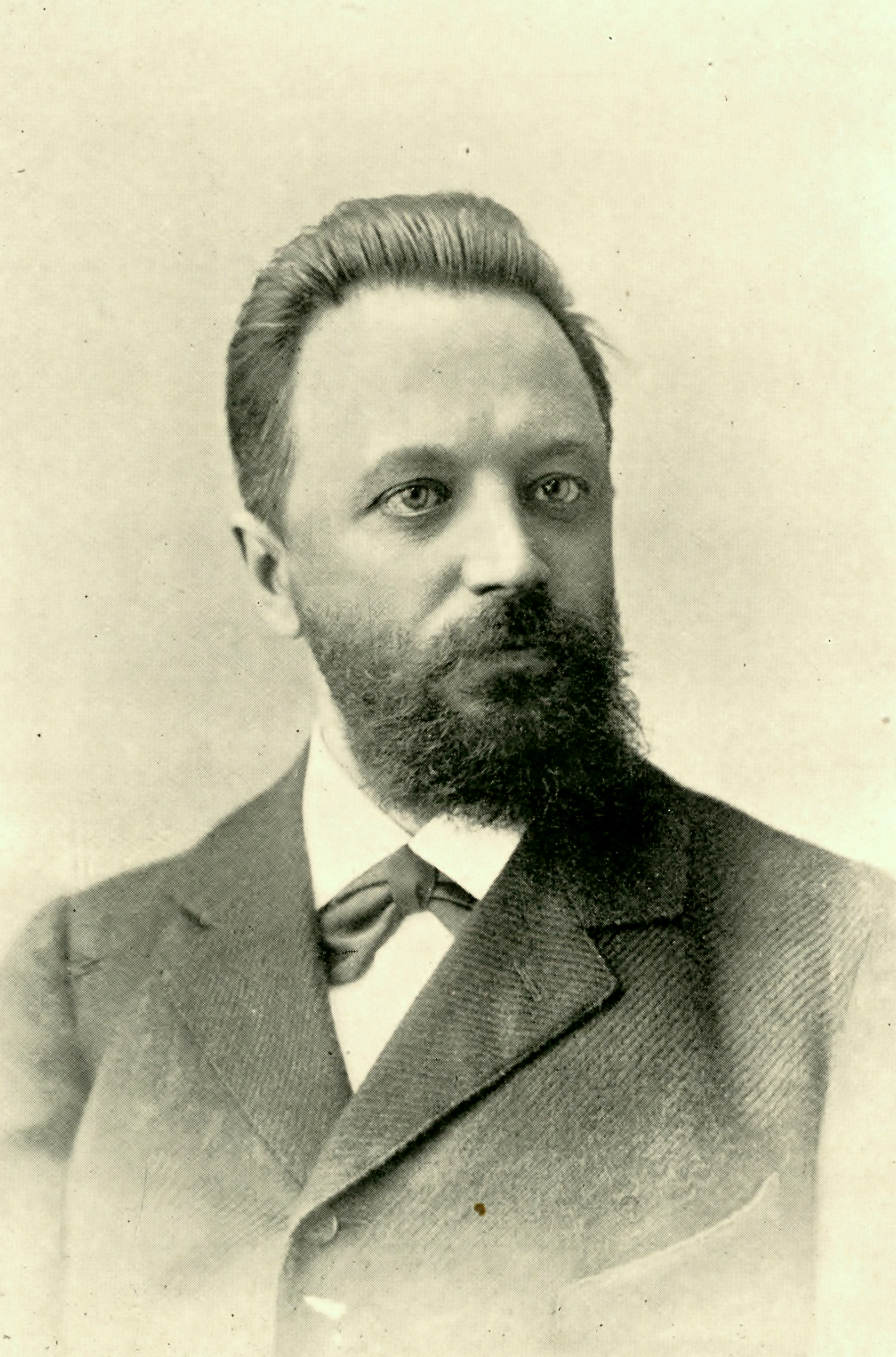 Mihhail Ivanovitš Tšigorin